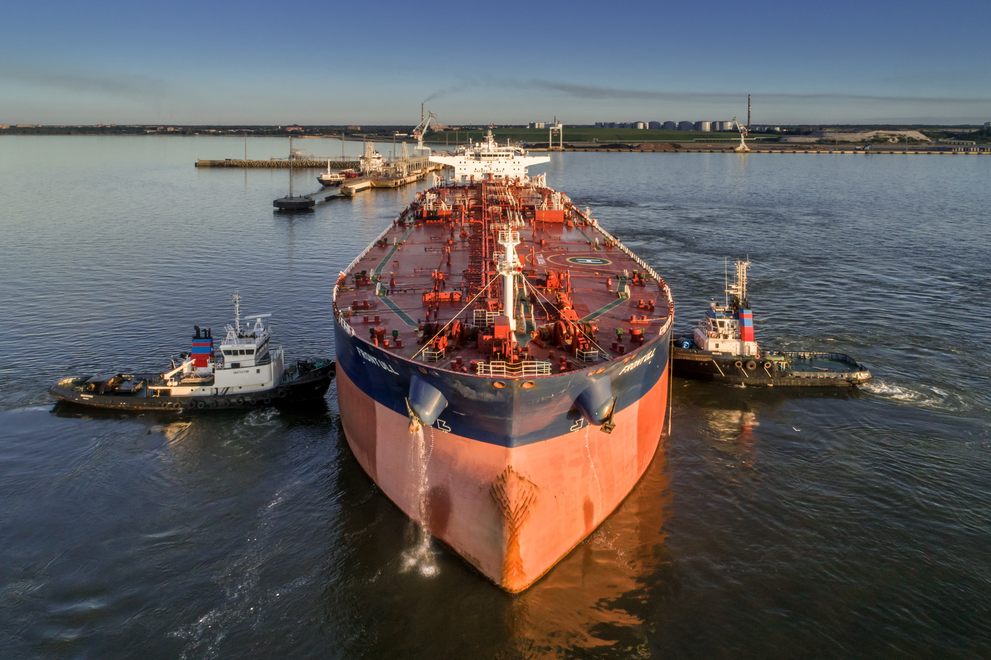 Tanker sildumas.